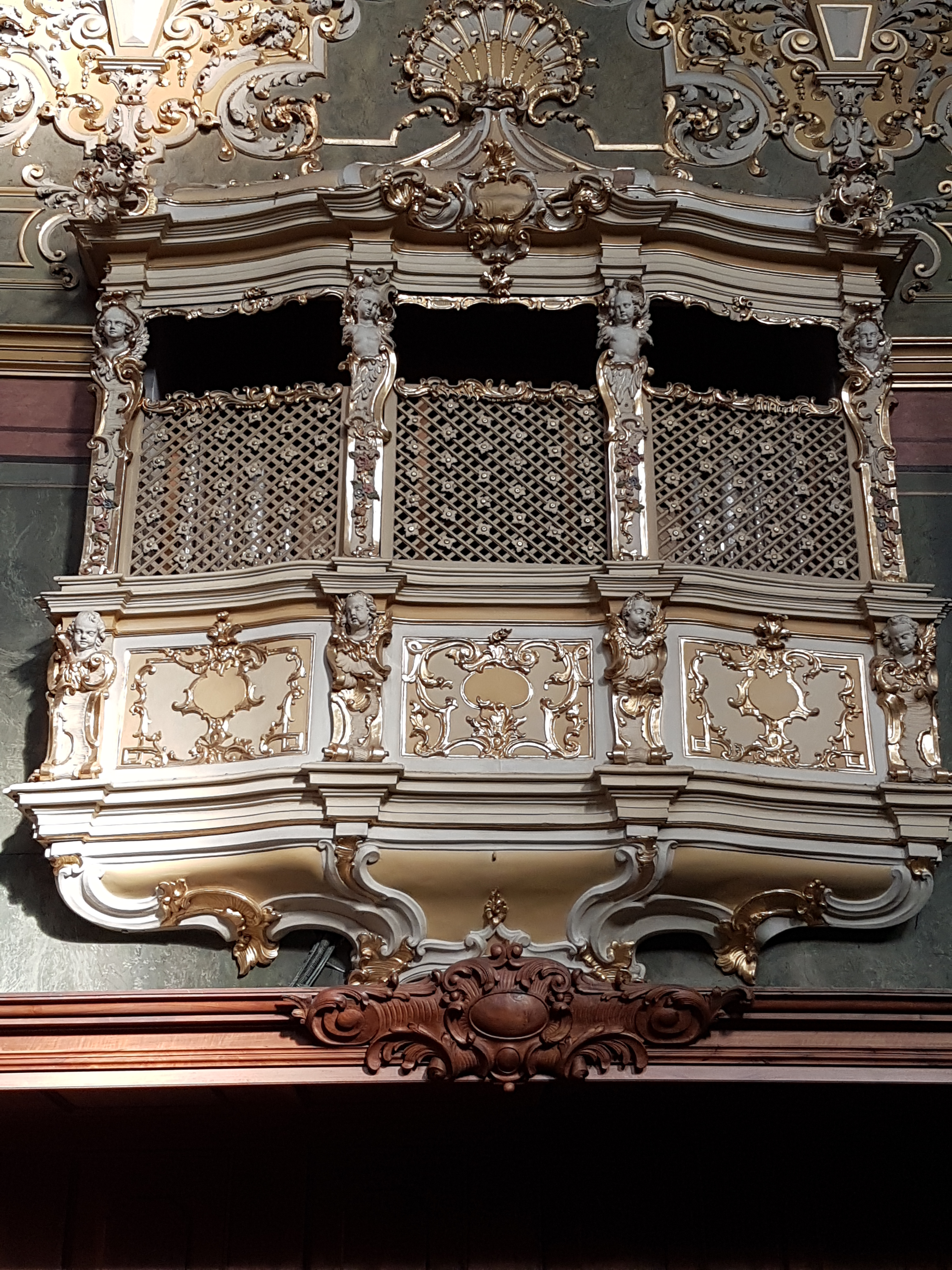 Chororgel („Chororgel Fürstbischof Kaspar Ignaz Graf Künigl“) des Domes zu Brixen; in der linken Loge eingebaut